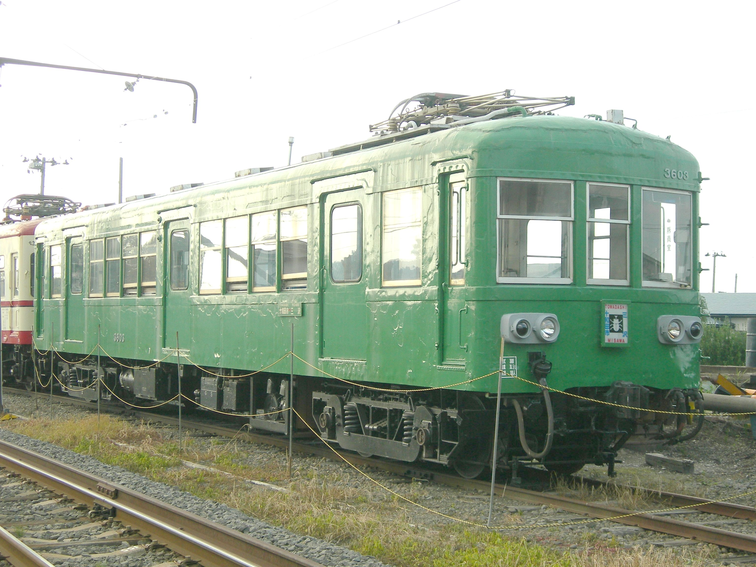 十和田観光電鉄線 モハ3600形（3603）